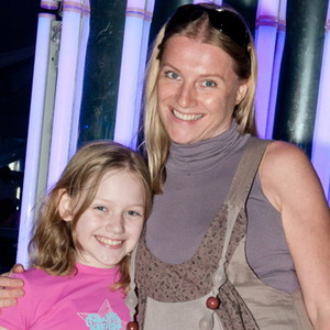 Галина Данилова с дочкой на ежегодном открытии летнего сезона в яхт-клубе «АДМИРАЛ». 2012 год